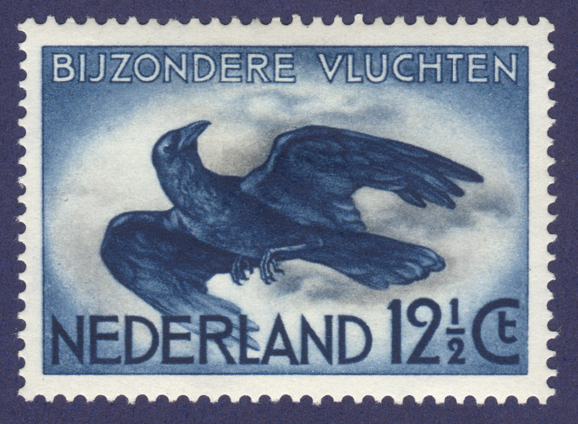 1936 Zegel voor bijzondere vluchten. Ontwerper Aart van Dobbenburgh